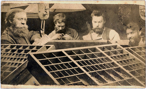 Наборня, где набрали “Вперед!” и разные брошюры; слева направо П.Л. Лавров, Я.В. Вощакин, А.Л. Линев, Л.Б. Гольденберг (BG A43/858, Из архива Смирнов)